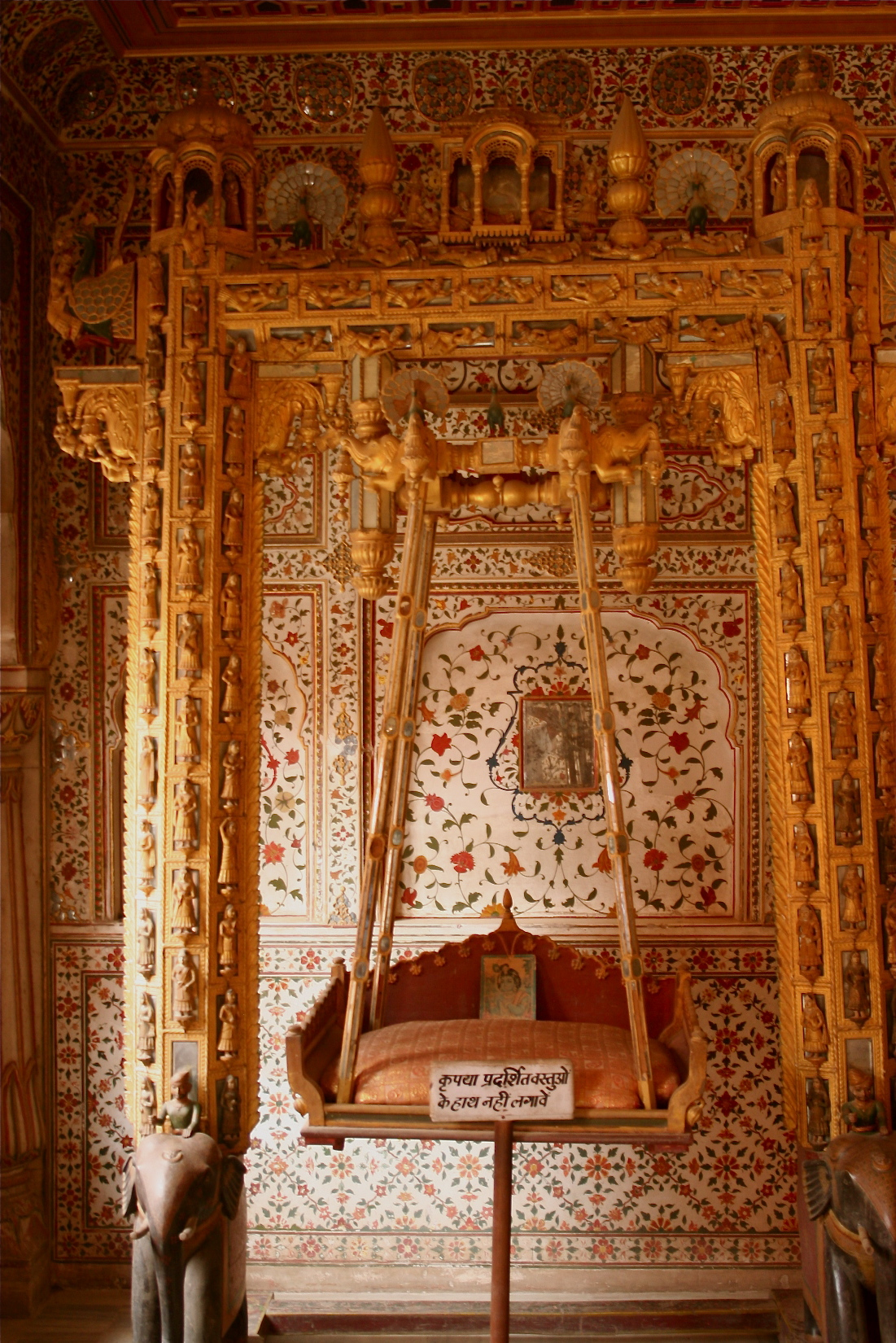 Junagarh fort, Bikaner, Rajasthan. Jul 2010.